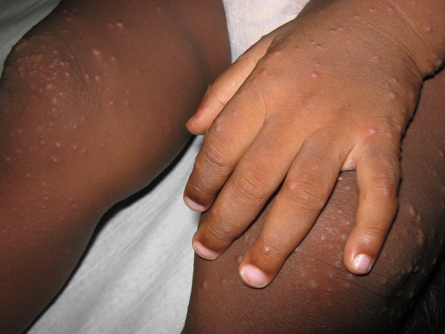 Syndrome pied main bouche